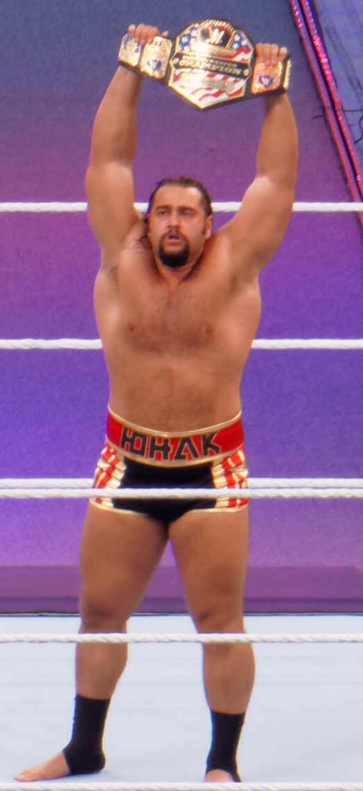 2015-03-29_18-06-04_ILCE-6000_8344_DxO